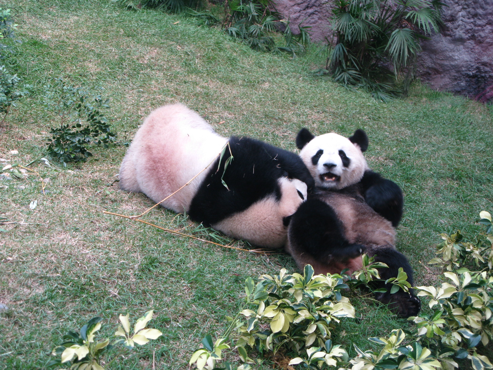 中華人民共和國中央人民政府向澳門特別行政區贈送的一對大熊貓——開開、心心。